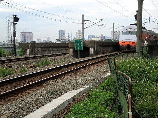 台鐵第三代第二大嵙崁溪橋(1991) was filmed by TDCKW on 20050625